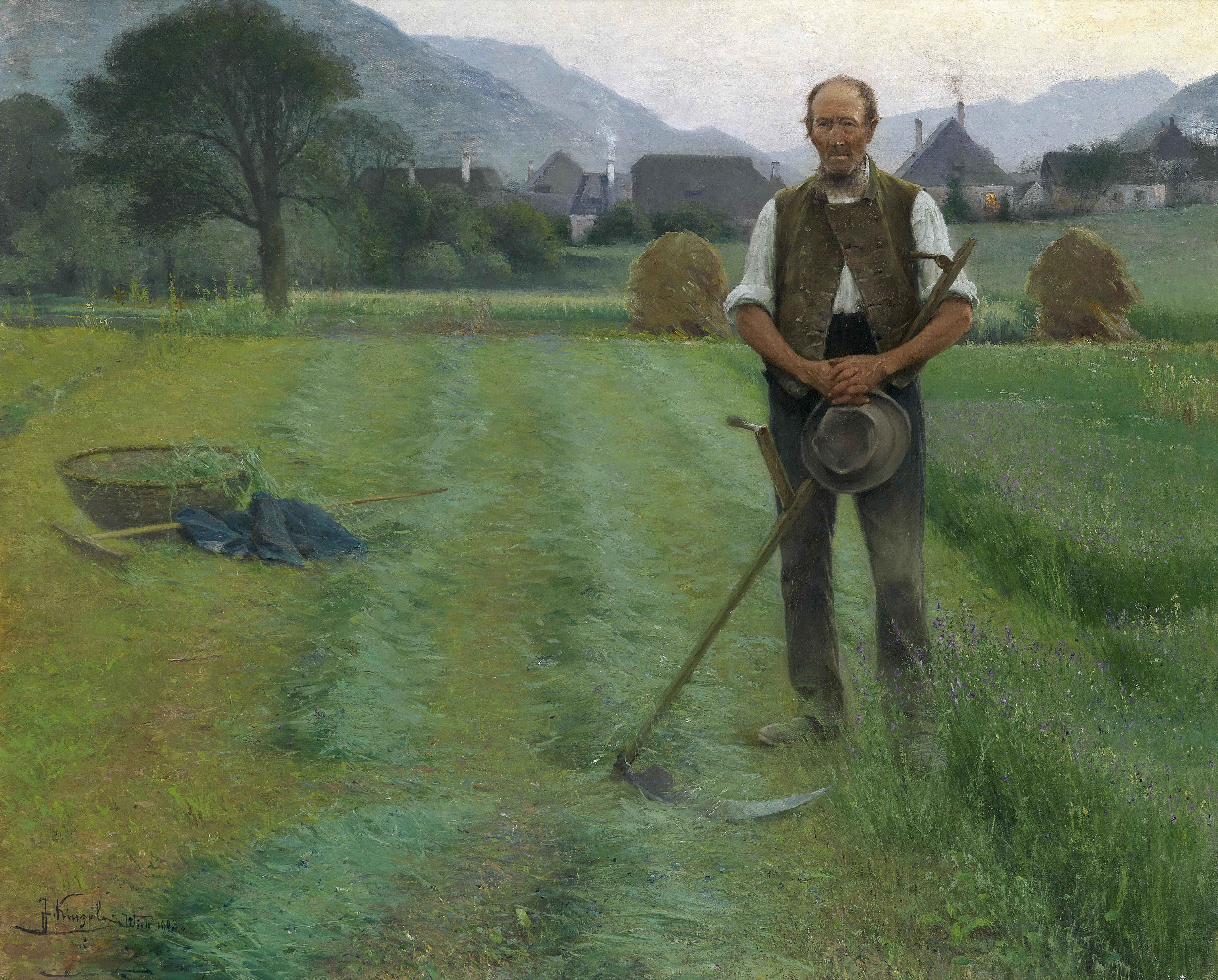 Abendläutentitle QS:P1476,de:"Abendläuten" label QS:Lde,"Abendläuten"